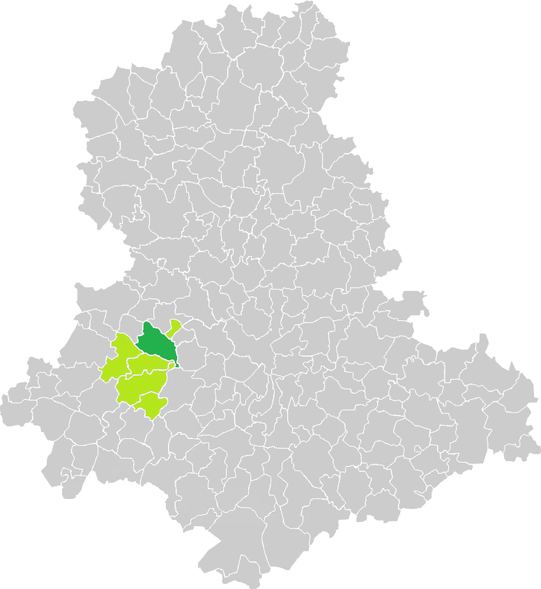 Carte de situation de la commune de Cognac-la-Forêt (en vert foncé) dans le votre Canton (en vert clair) sur une carte des communes de la Haute-Vienne